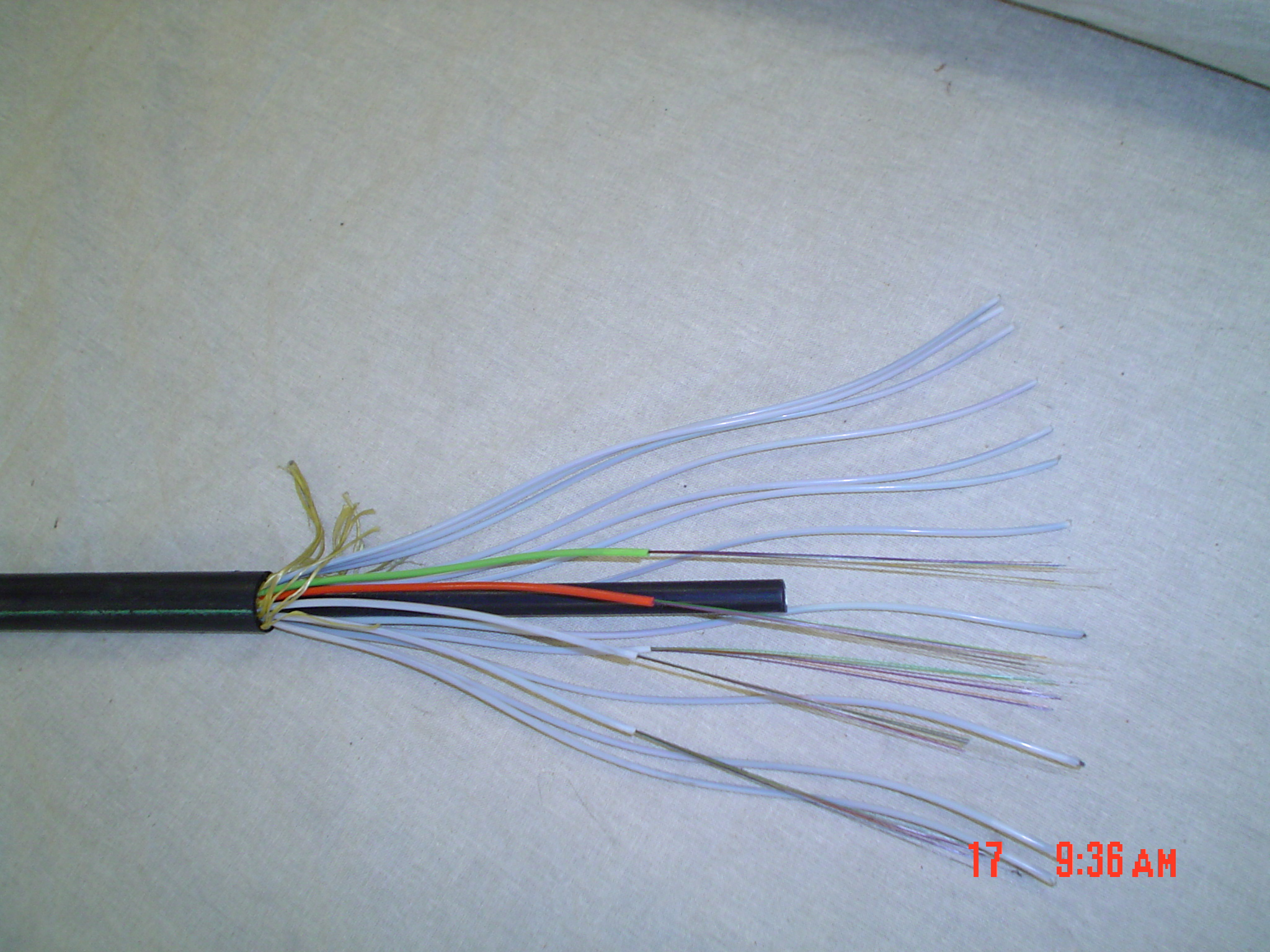 Optika (vitra) kablo